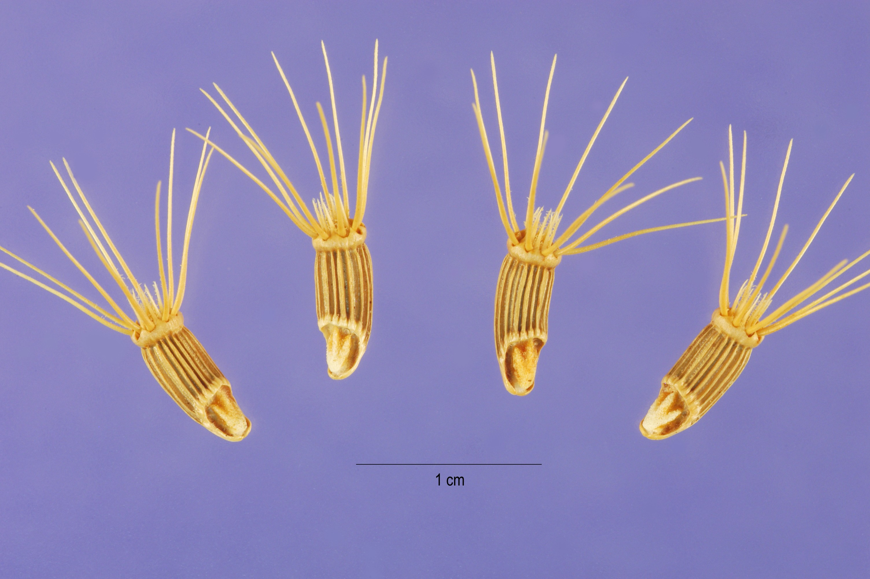 Centaurea benedicta (Cardo bendito) : Aquenios sueltos (cipselas).